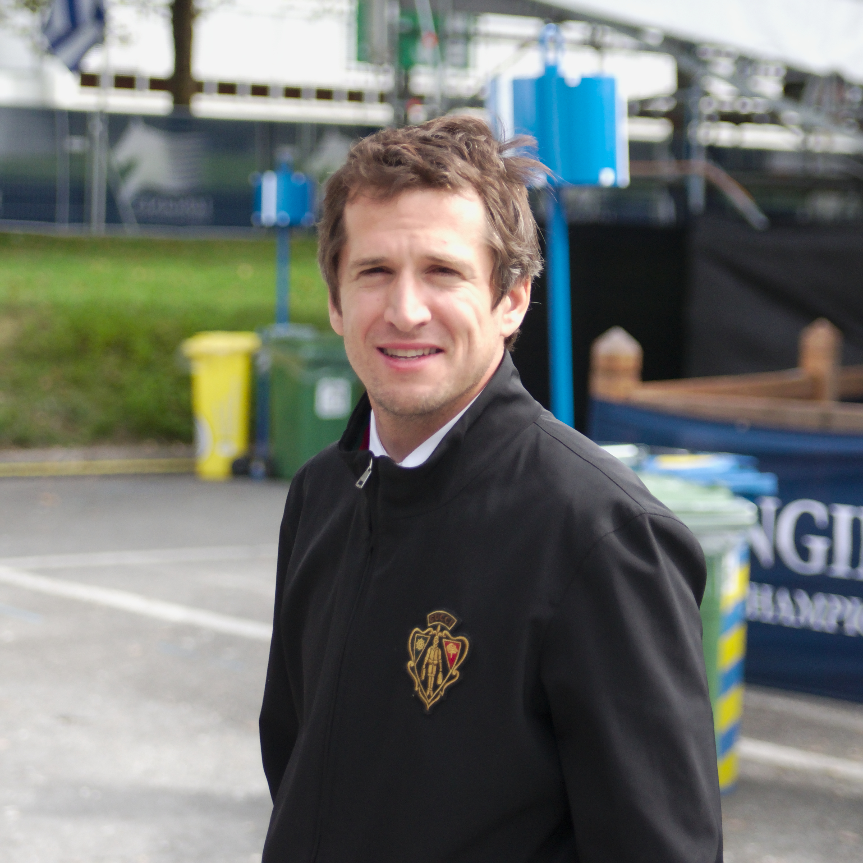 2013 Longines Global Champions - Lausanne - 14-09-2013 - Guillaume Canet